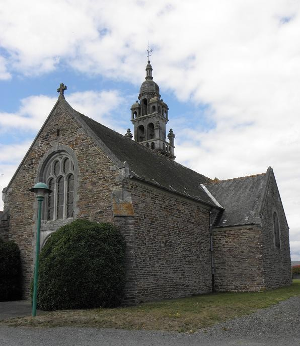 Église de la Sainte-Trinité à Moussé (35).